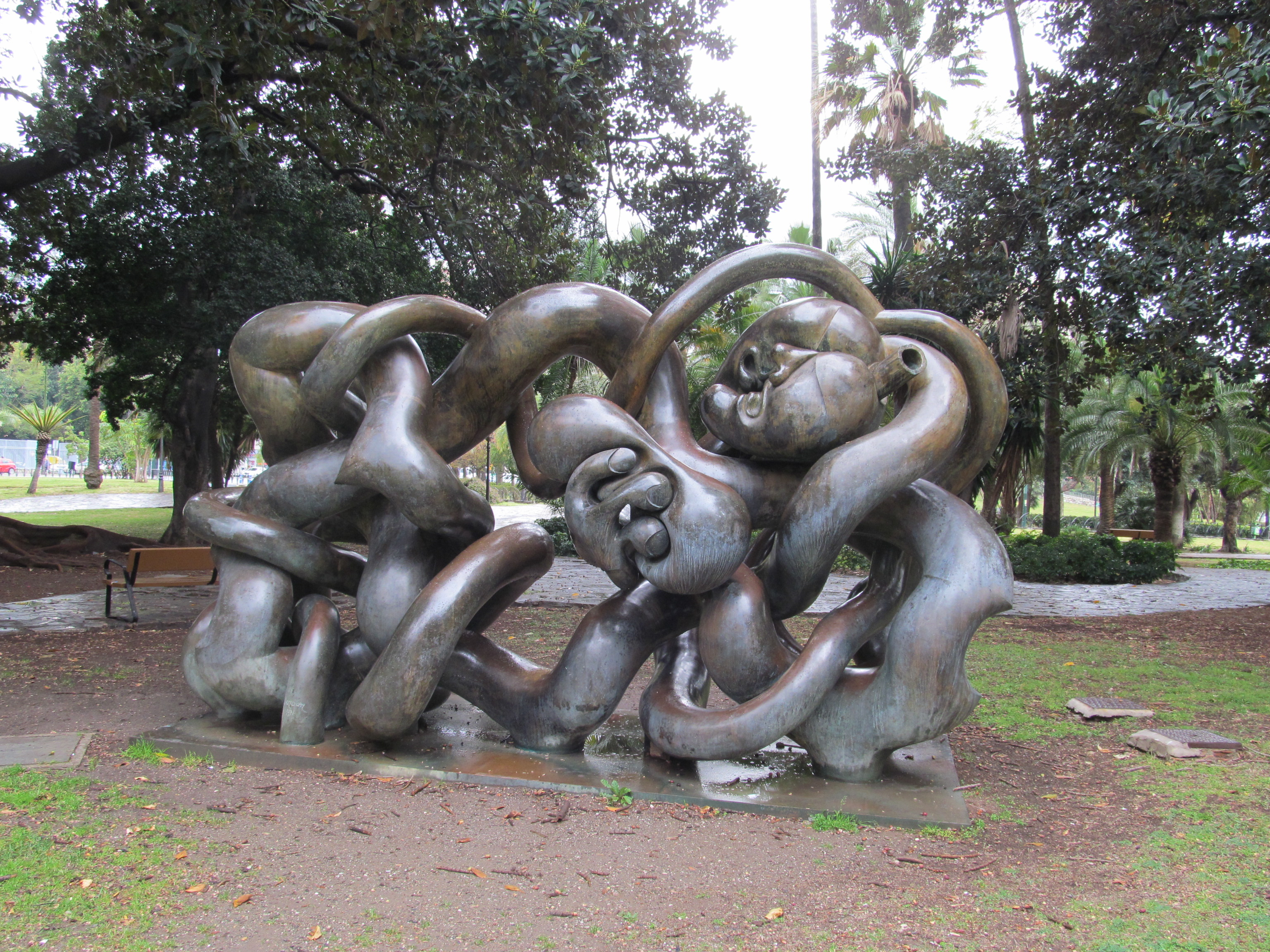 Escultura en recuerdo a Pablo Ruiz Picasso, inaugurada en 1977 por el escultor Miguel Ortiz, obra denominada Siéxtasis, ubicada en los Jardines de Picasso en Málaga. Según Berrocal, representa dos cuerpos -uno femenino y otro masculino- abrazados ante un corazón, cuyas arterias les rodean en una composición progresiva.